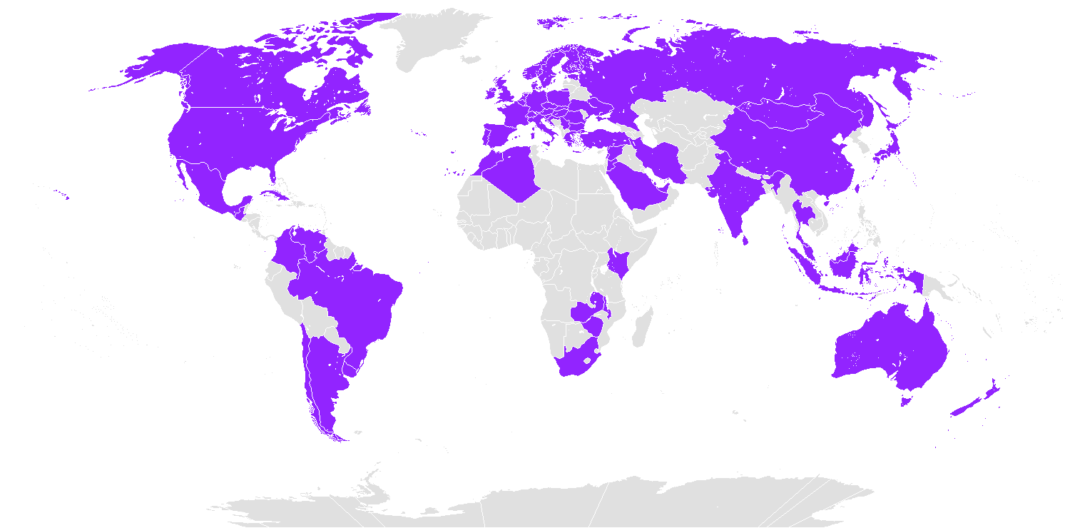 Mapa przedstawiająca państwa z których byli kierowcy wszystkich klas Motocyklowych Mistrzostw Świata